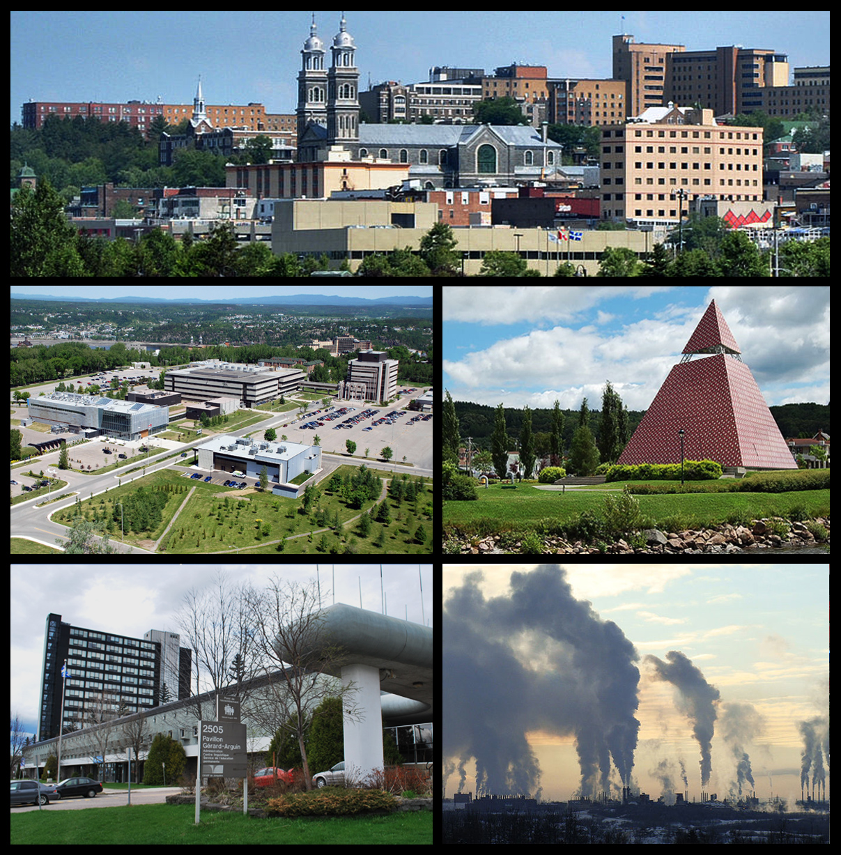 Montage photo de la ville de Saguenay. De gauche à droite et de haut en bas : Le centre-ville de Chicoutimi, le campus de l'Université du Québec à Chicoutimi, la Pyramide des Ha! Ha! à La Baie, l'entrée du pavillon Gérard-Arguin du Cégep de Jonquière et les installations de l'usine de Rio-Tinto-Alcan à Arvida.